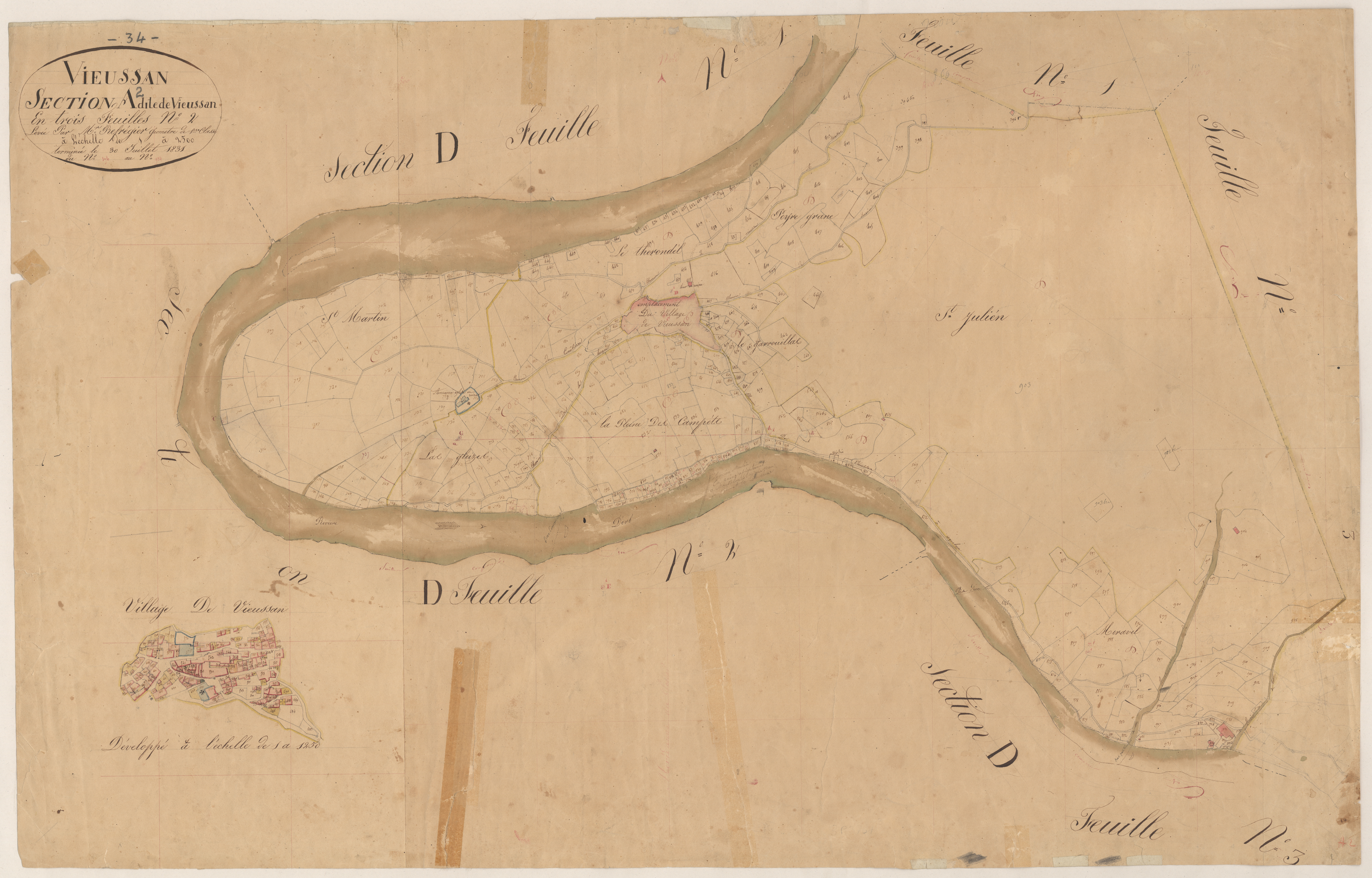 Vieussan. - Cadastre napoléonien : section A2 de Vieussan.